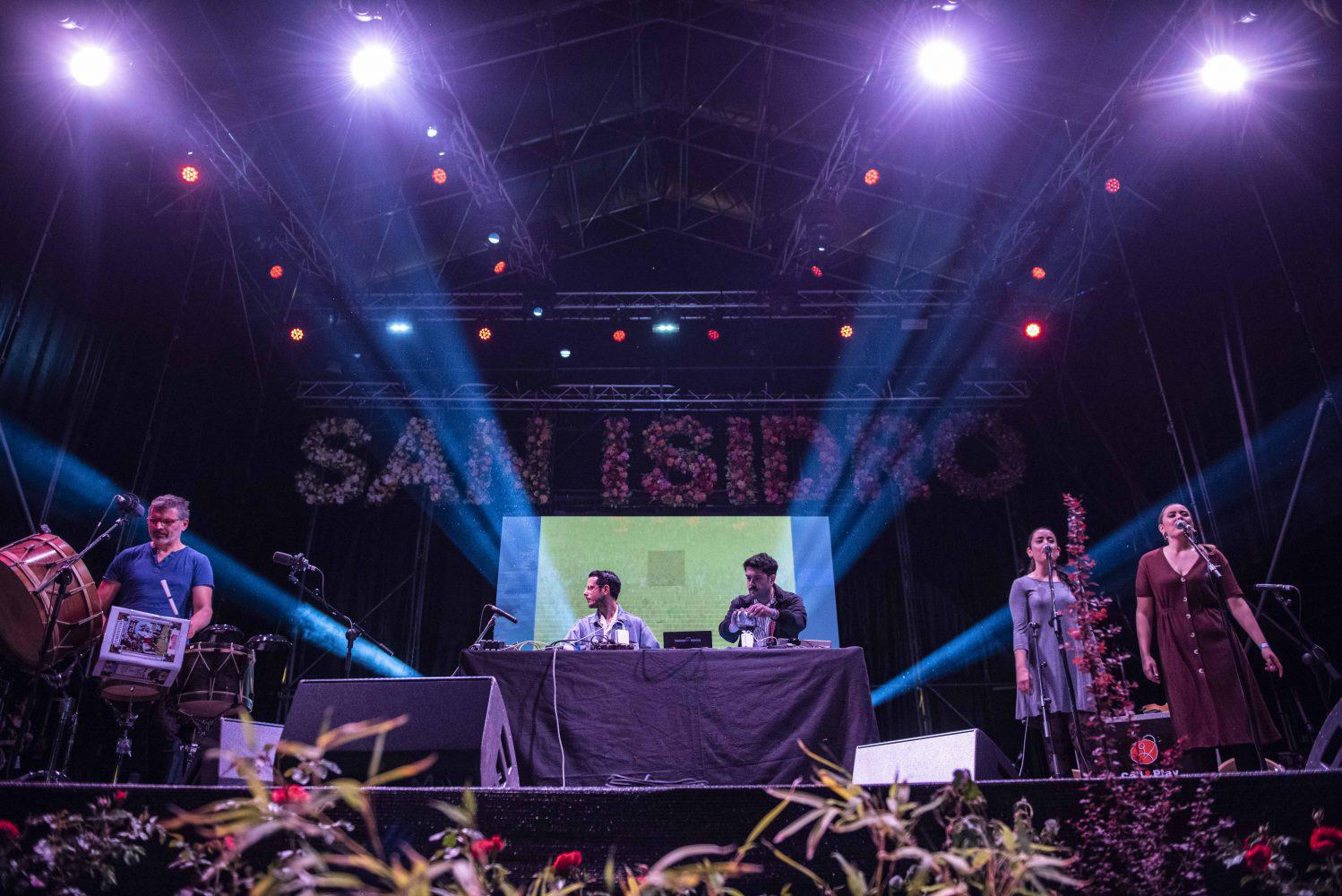 Los sonidos más rumberos se apoderaron ayer de la noche madrileña. Miles de personas abarrotaron los escenarios, a un lado y a otro del río.